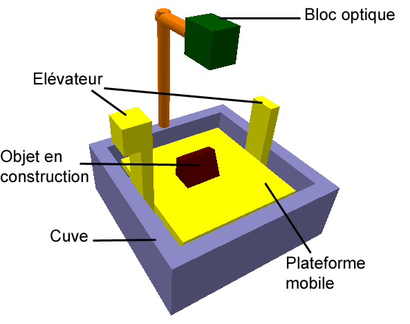 Structure d'un appareil de stereolithographie/Stereolithography apparatus description